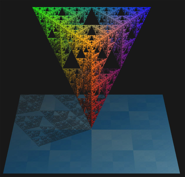 Sierpinskitetraed, en variant av fraktalen Sierpinskitriangel. För en beskrivning av tekniken som använts för att rendera bilden se: sv::Bild:Sierpinskipyramid.jpg. Andra bilder i samma serie: Linjära fraktaler i 3D: Bild:Sierpinskipyramid.jpg|right|thumb|Sierpinskipyramid Bild:Cantorkub (Fraktal).jpg|right|thumb|Cantorkub Bild:Mengers tvättsvamp (Fraktal).jpg|right|thumb|Mengers tvättsvamp Kategori:Bilder av fraktaler